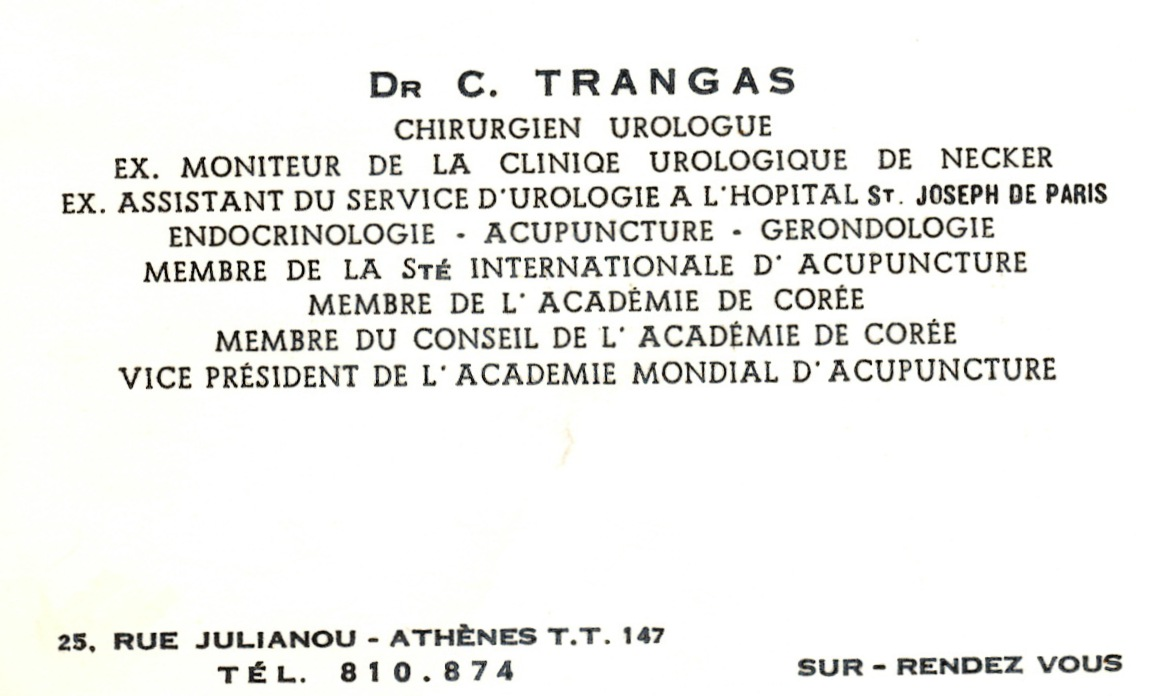 Επαγγελματική κάρτα του Dr. Κωνσταντίνου Τράγκα. Από το προσωπικό αρχείο της ανιψιάς τους Χριστίνας Τράγκα.